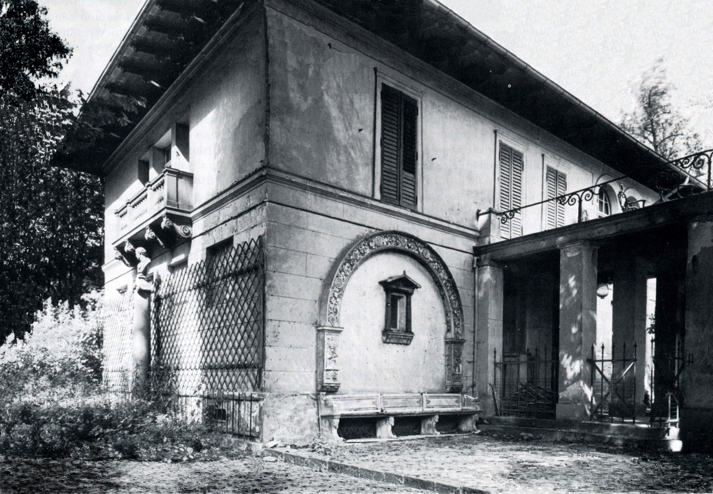 Park Klein-Glienicke, Westende des Kavalierflügels, Zustand 2. H. 19.Jhd. Fotomontage unter Verwendung eines Fotos von 1937